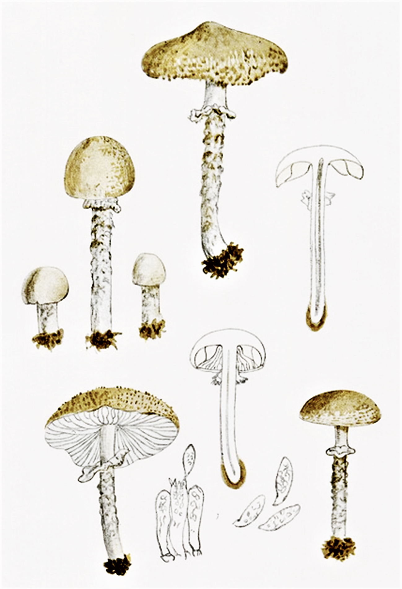 Giacomo Bresadola: Lepiota clypeolaria (Bull., 1789) P.Kumm. (1871)